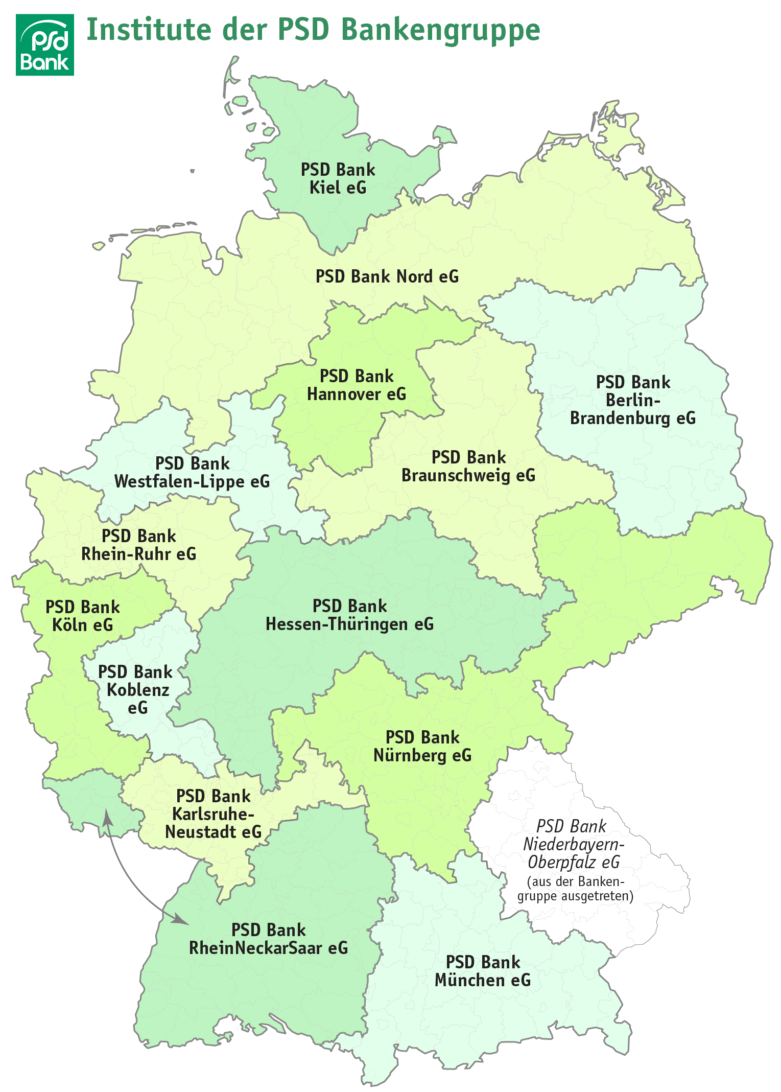 Karte der PSD Bankengruppe